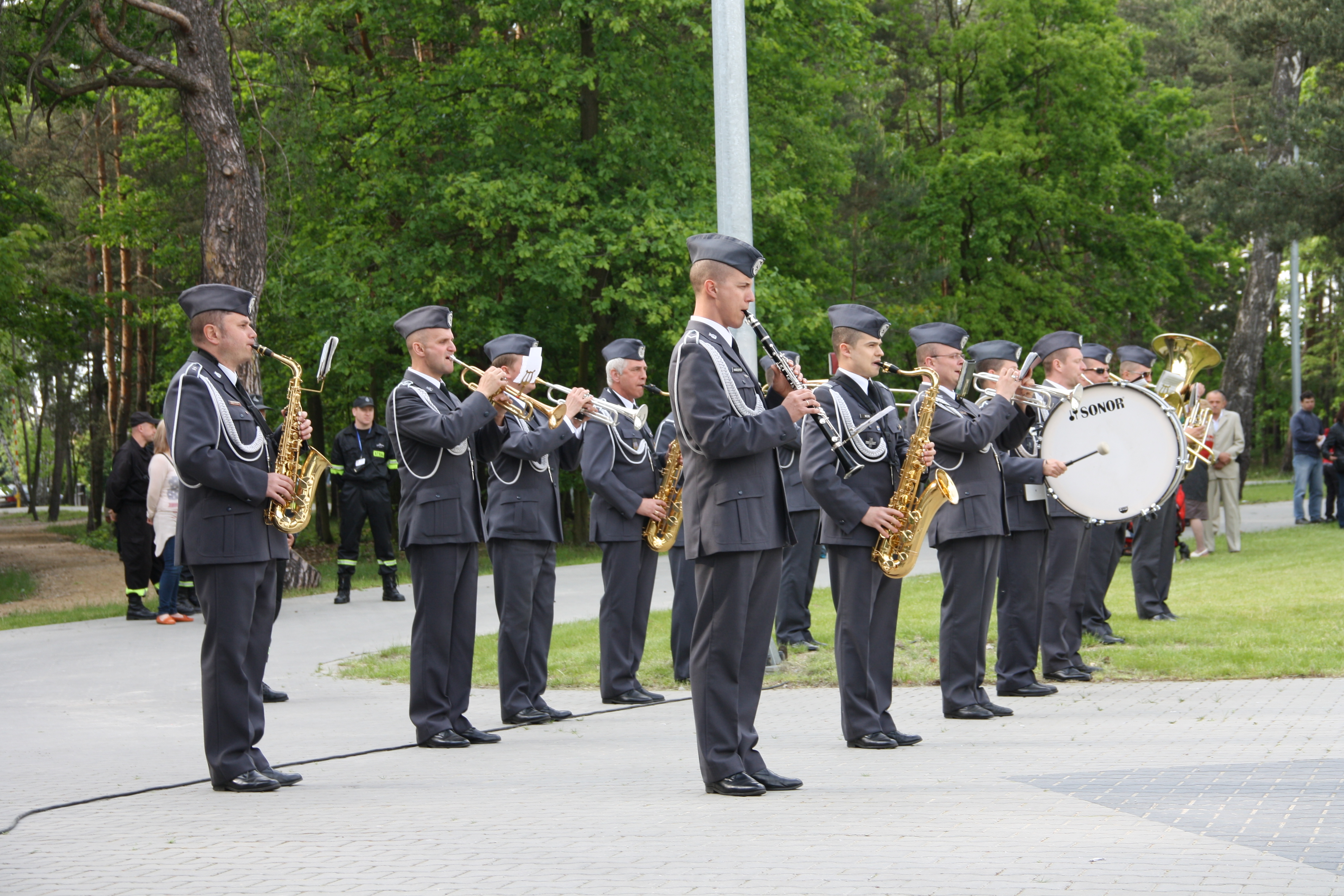 Orkiestra Wojskowa Sił Powietrznych z Bytomia podczas obchodów dnia Samorządowca w Aleksandrowie Łódzkim